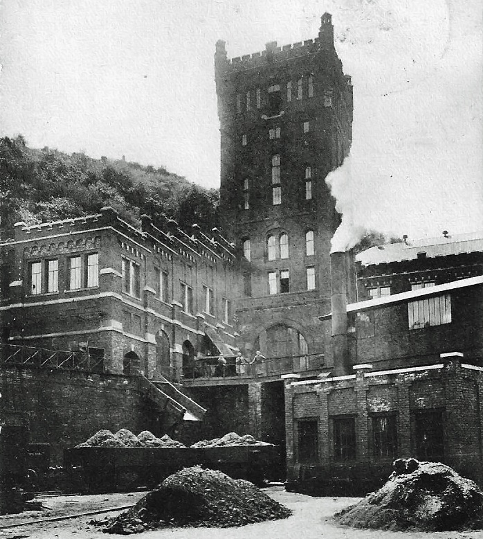 La tour du puits n°1 du charbonnage du hasard de Cheratte en Belgique.